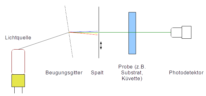 Prinzipskizze eines Spektralphotometers (Einstrahlverfahren). Das Licht einer Quelle wird durch ein Beugungsgitter spektral zerlegt, bevor es auf einen Spalt fällt. Hinter dem Spalt befindet sich die zu untersuchende Probe (Küvette oder optisches Element). Ein Photodetektor registriert die durch die Probe beeinflusste Intensität des Lichtes. Über das Kippen des Beugungsgitters oder Verschieben des Spaltes kann die Wellenlänge des Lichtes durchgestimmt werden.